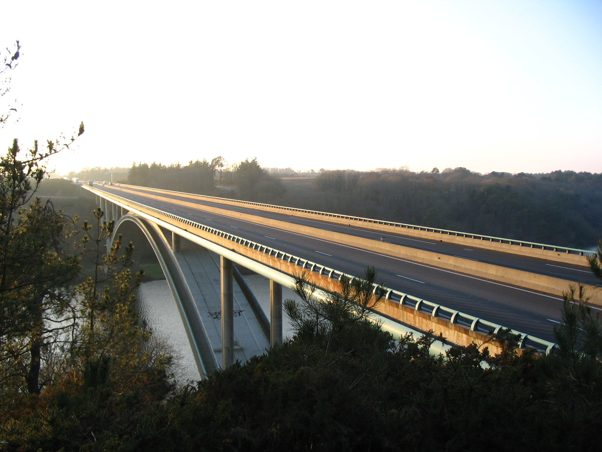 Pont du Morbihan. Prise de vue depuis Bourrigan en Nivillac.